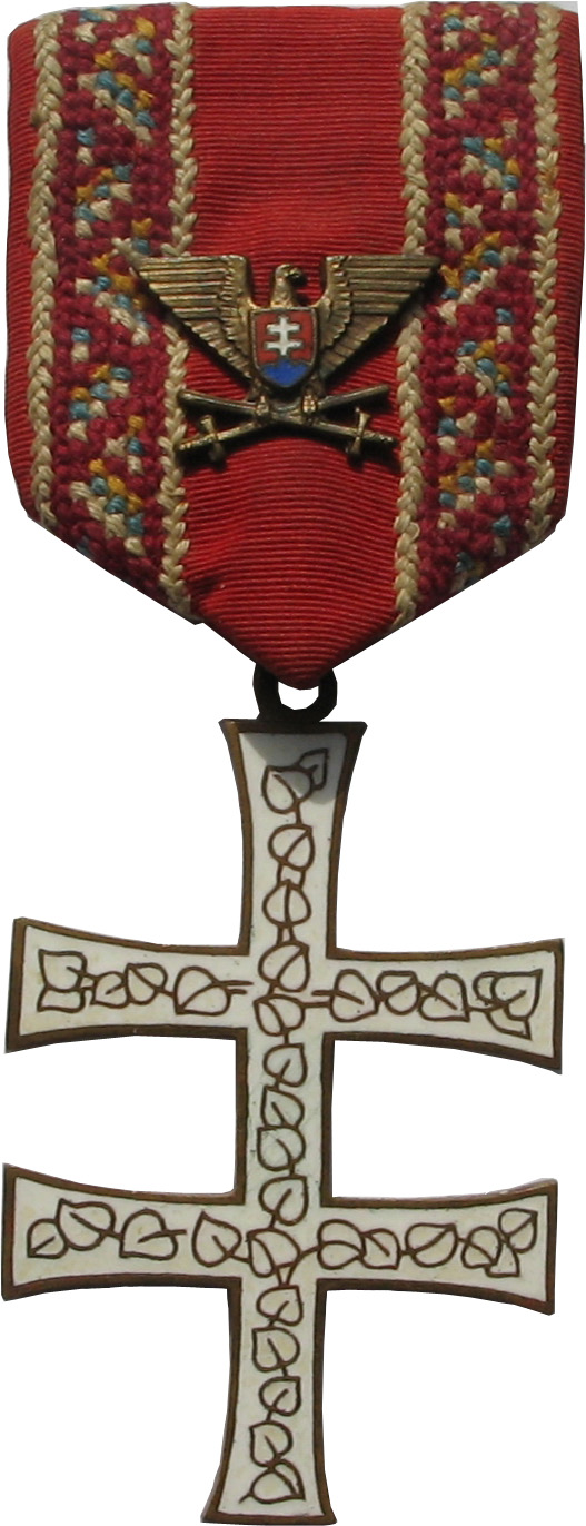 Bronzový Vojenný víťazný kríž z roku 1943, 4. triedy. Jej autorom bol Anton Hám, Štefan Ondrkal a Štefan Grosch